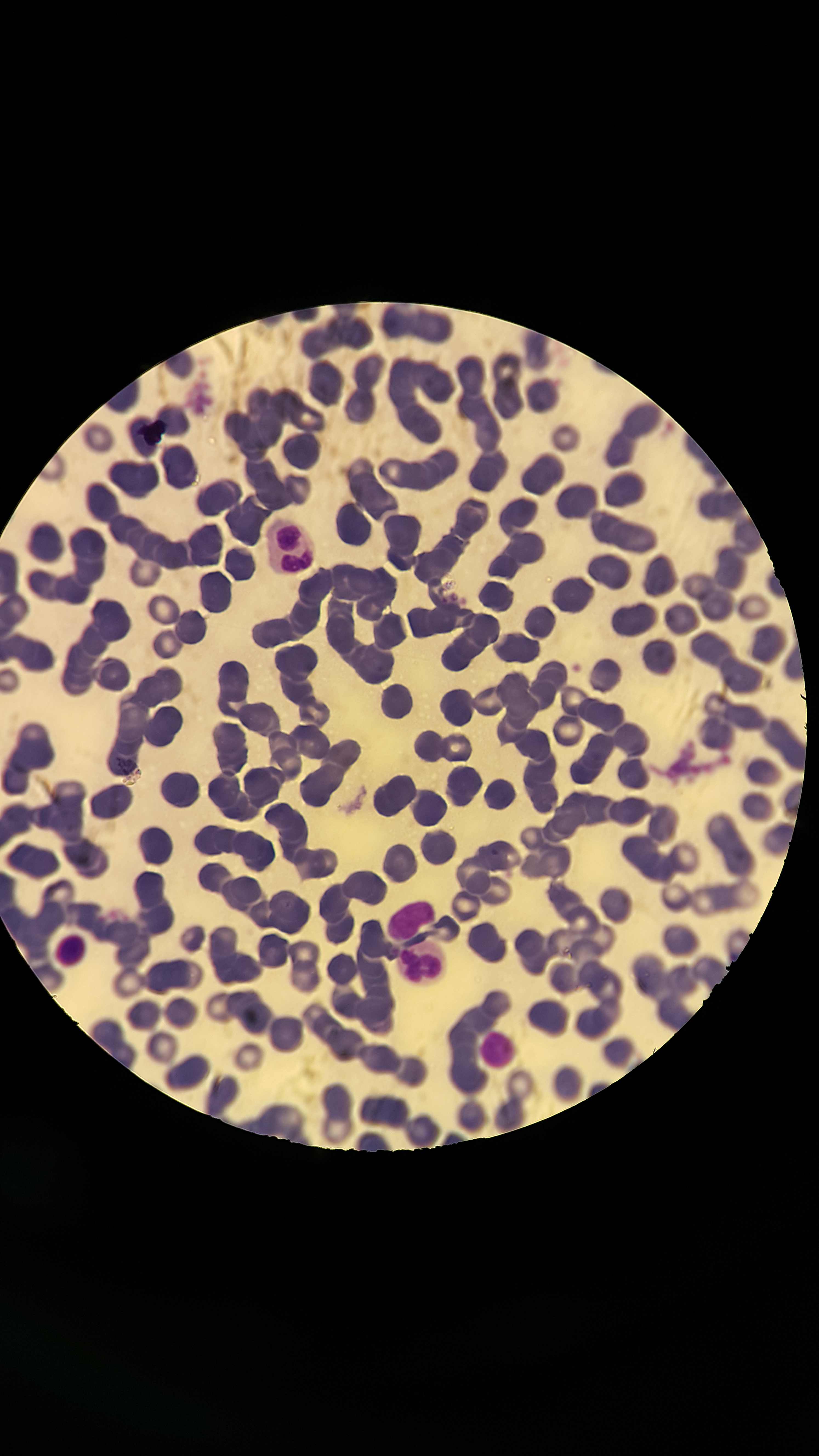 Se observan glóbulos rojos en color morado y linfocitos en color violeta con sus respectivos núcleos; observadas en el laboratorio del Tecnológico de Monterrey Campus Ciudad de México.